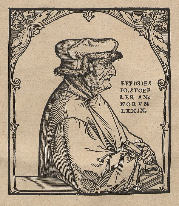 Original image description from the Deutsche Fotothek Porträt